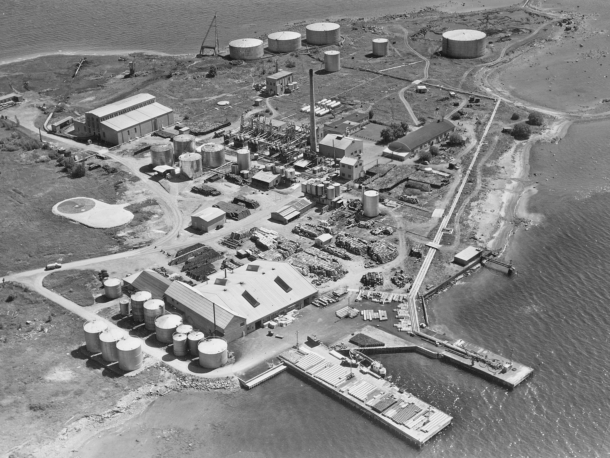 Bildet er hentet fra Arkivverket. Flyfoto. Ca. 1960 , se brannøvelsesfeltet. Arkivinstitusjon : Statsarkivet i Stavanger Arkivnavn : Pa 1536 - Esso Norge as, Vallø Oljeraffineri og lager Sted : Norge, Vestfold, Tønsberg, Valløy Emneord: Olje, Oljeraffineri, Petroleum Avbildet